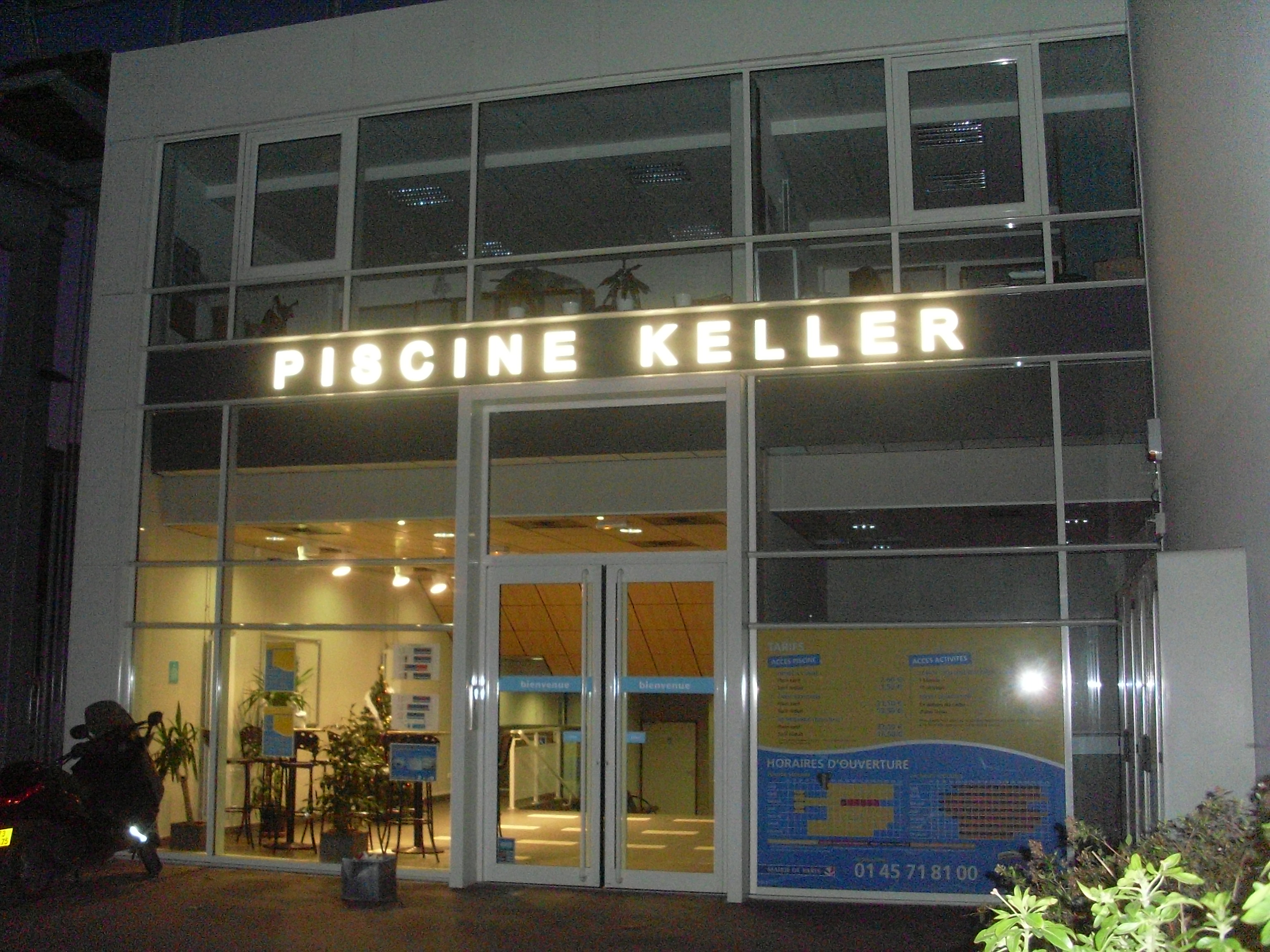 Facade de la piscine keller.